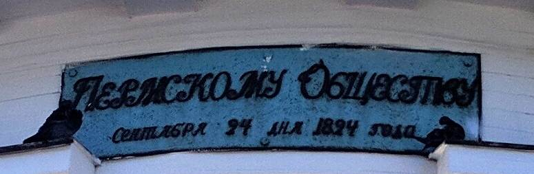 Табличка с надписью на пермской ротонде